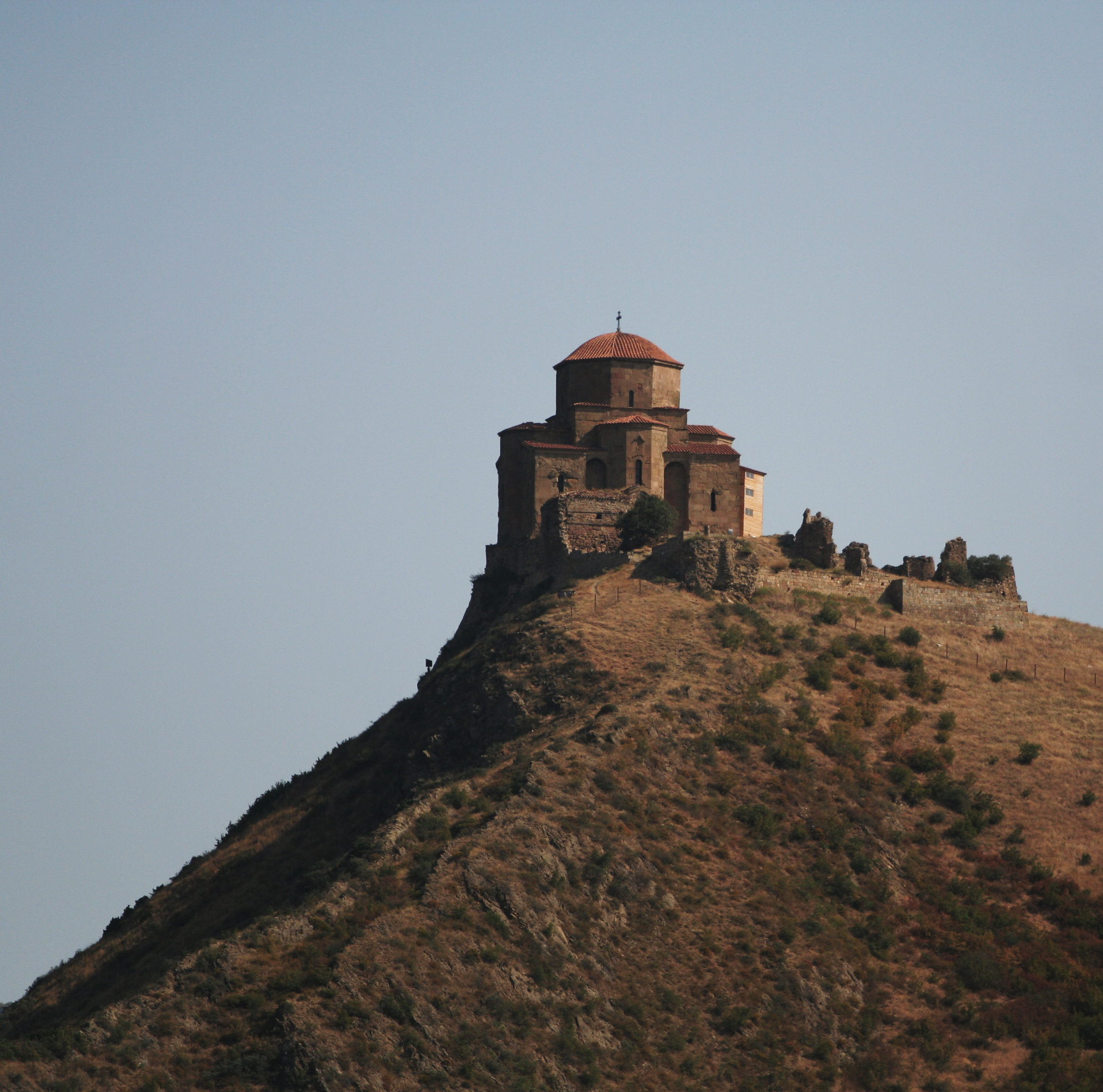 Jvari monastery